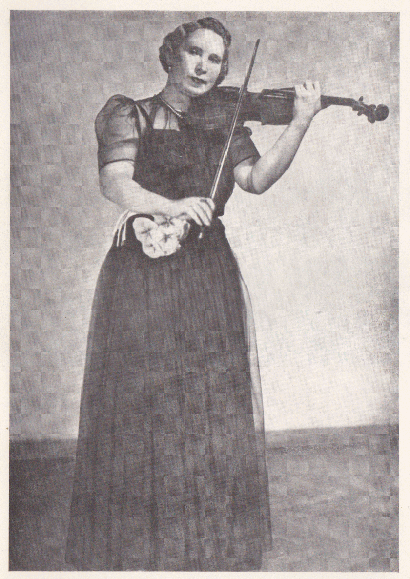 Ervína Brokešová (* 27. ledna 1900, Praha – 19. října 1987, Rožmitál pod Třemšínem) česká houslistka, žačka Otakara Ševčíka. Foto z roku 1941 krátce před úderem gestapem (nejpíše před 15. prosincem 1941) Po okupaci Československa se její manžel Karel Josef Beneš (* 21. února 1896, Praha – 27. března 1969, Rožmitál pod Třemšínem) a Ervína Brokešová zapojili do ilegální odbojové činnosti v organizaci Petiční výbor Věrni zůstaneme (PVVZ). Karel Josef Beneš byl v prosinci 1941 zatčen. Jeho žena pak absolvovala řadu výslechů. Navzdory tomu pokračovala v odbojové činnosti pod krycím jménem Foška jako spojka mezi Prahou a Rožmitálem. Mimo to se pokoušela navštěvovat vězněného manžela, aby mu ulehčila jeho věznění. Podařilo se jí proniknout i na soudní řízení v Drážďanech v roce 1944, kde byl jejímu muži původně navrhován trest smrti. Nakonec byl odsouzen k sedmi letům žaláře. Z nacistického vězení se šťastně vrátil v květnu 1945.